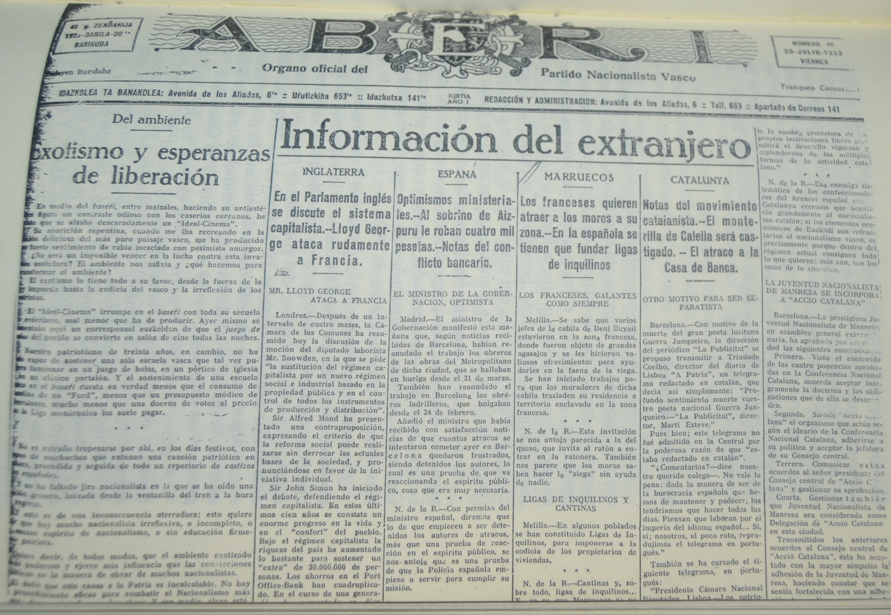 Aberri, euska egunkari abertzalea 1923an. Aberri, basque nationalist newspaper in 1923.